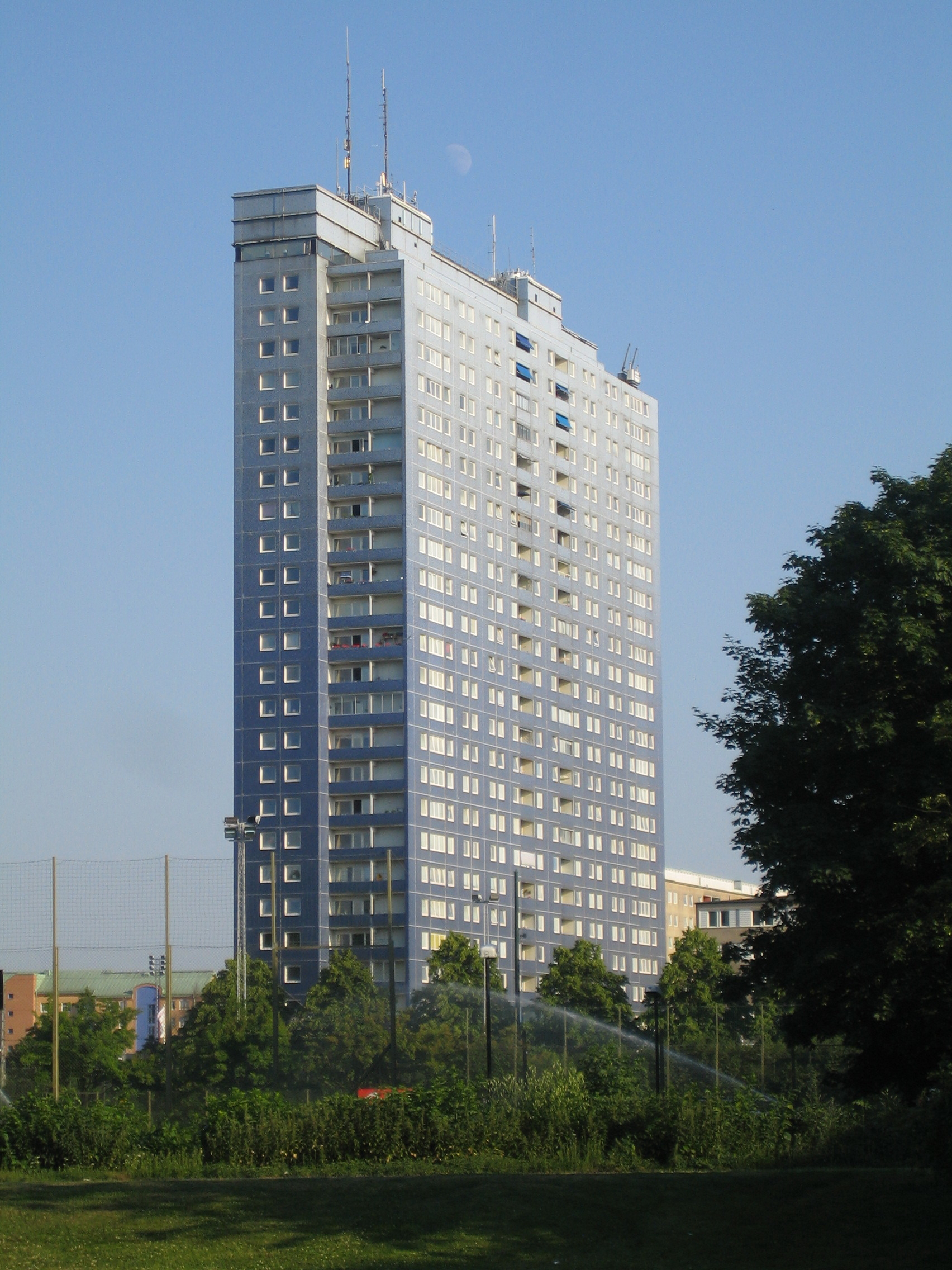 Kronprinsen in Malmö, Sweden